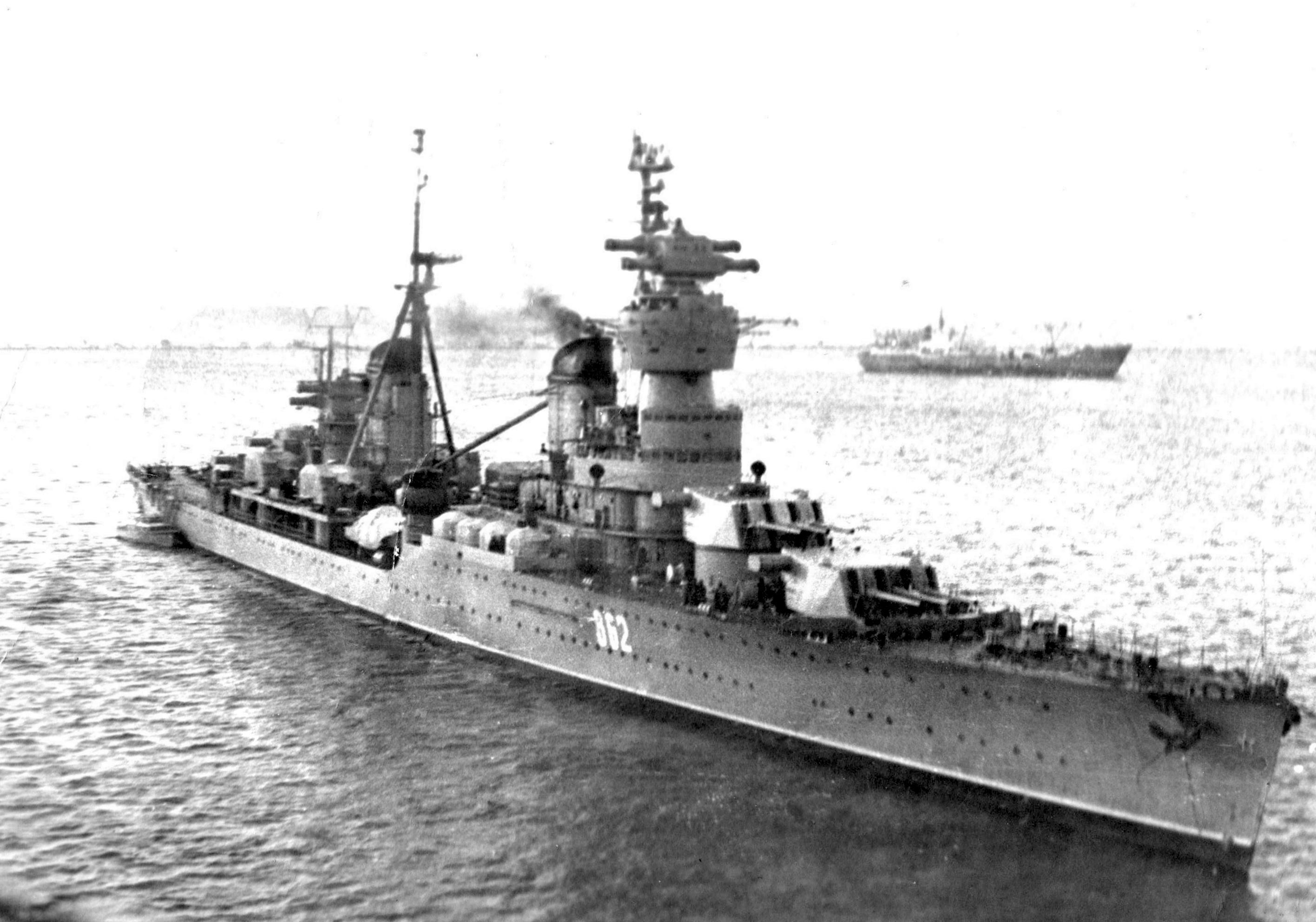 Легкий крейсер пр.68-К "Железняков"